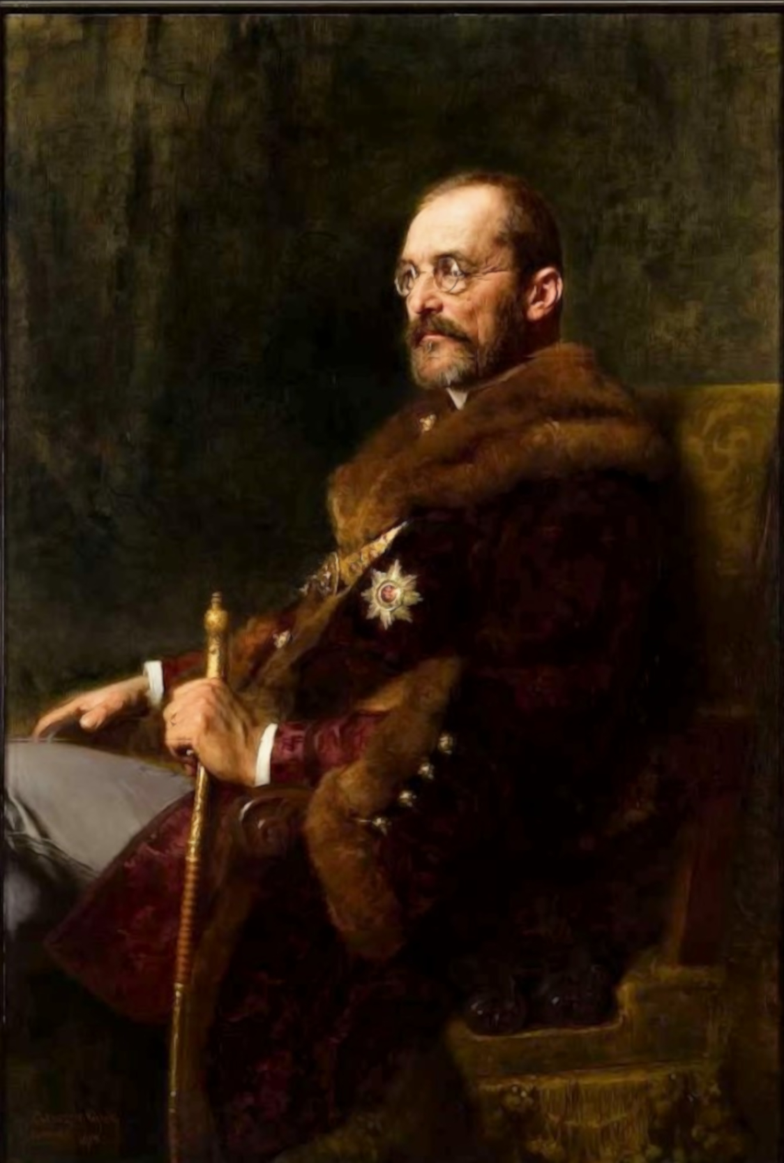 Painting of Hungarian statesman István Tisza (1861–1918)